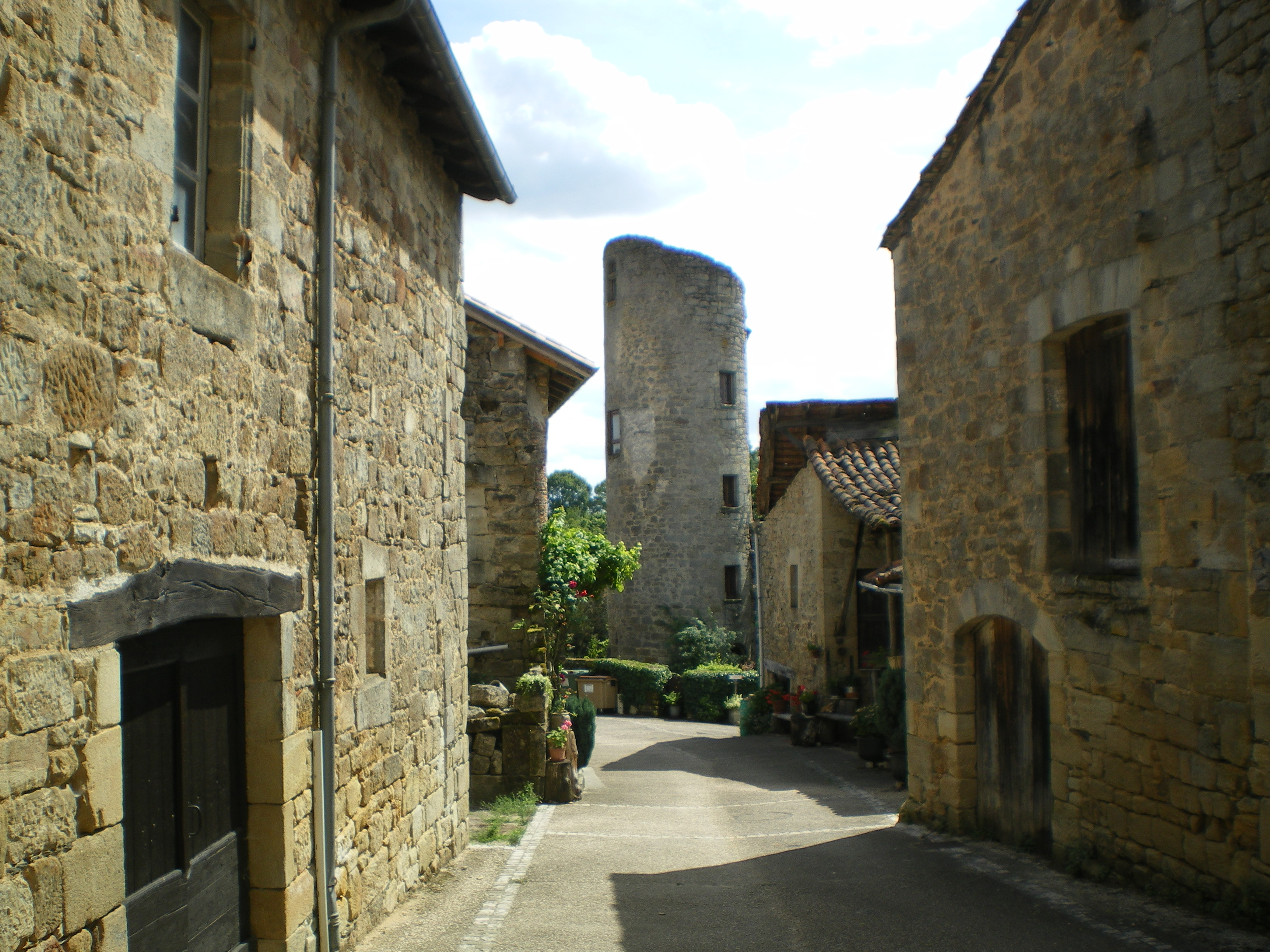 Cardaillac, Lot, France